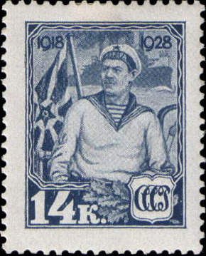 Почтовая марка СССР из серии «10-летие Красной Армии и Военно-Морского Флота СССР». На марке изображён моряк с «Авроры», сам крейсер, флаг ВМФ СССР. Художник — Д.Голядкин. Тираж — 750 тыс. Номер по каталогу ЦФА — 304. Описание — по «Каталогу почтовых марок СССР 1918—1974», М., ЦФА, 1976.